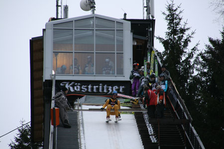 Multiraum der Marktiegeslschanze Lauscha, während eines Wettkampfes als Aufwärmraum genutzt